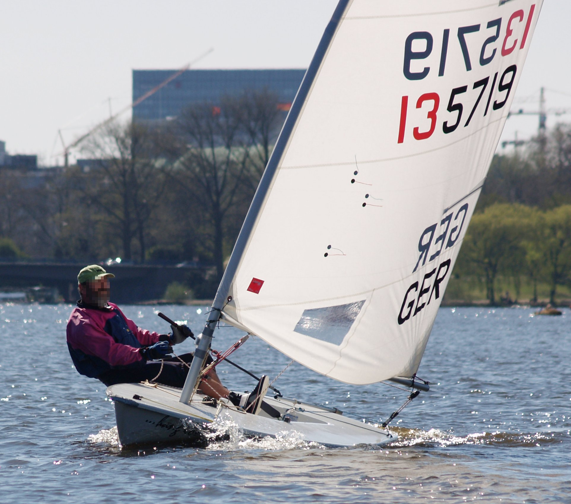 Laser